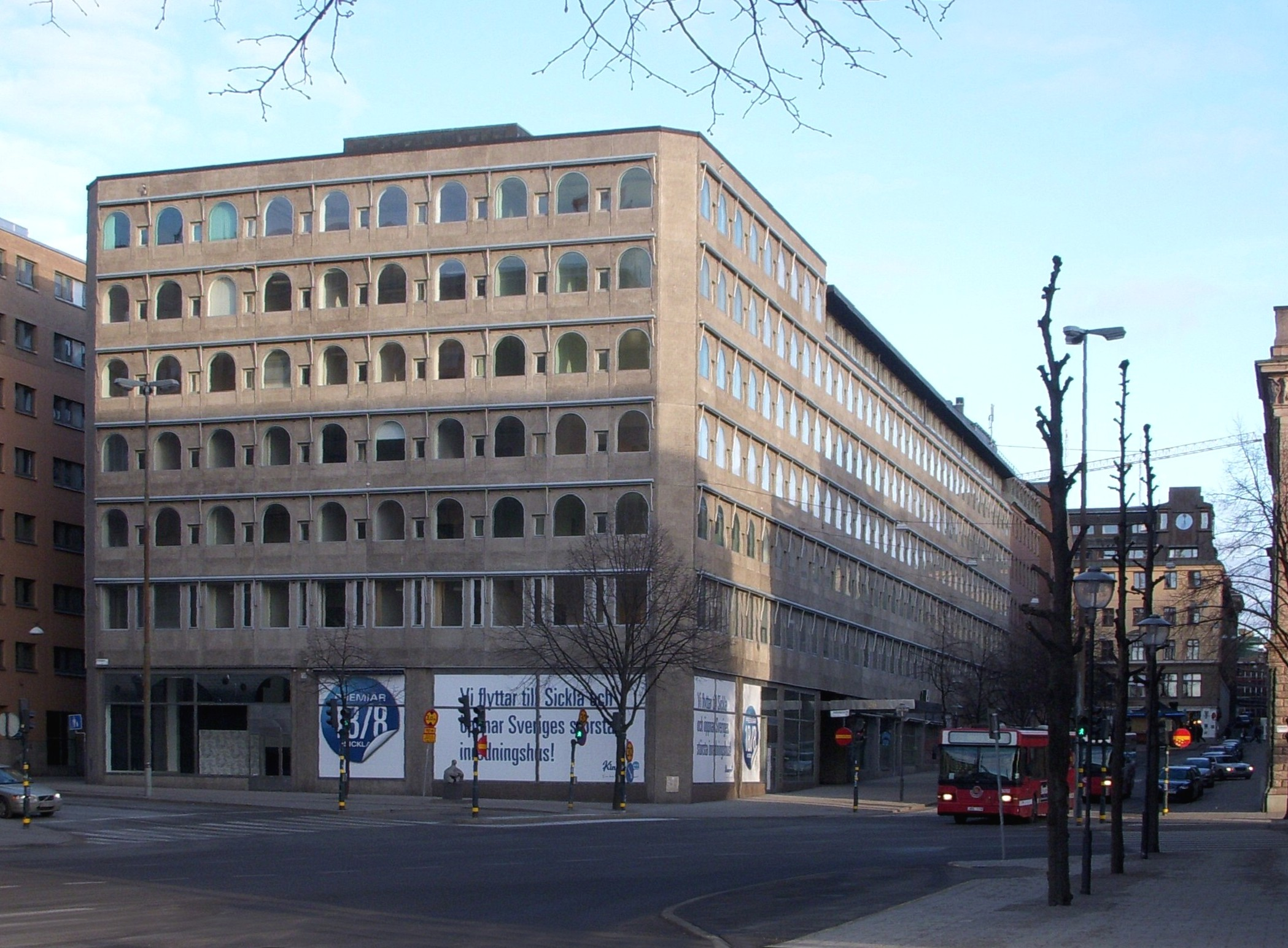 Departementshuset vid Jakobsgatan i Stockholm, Norrmalm